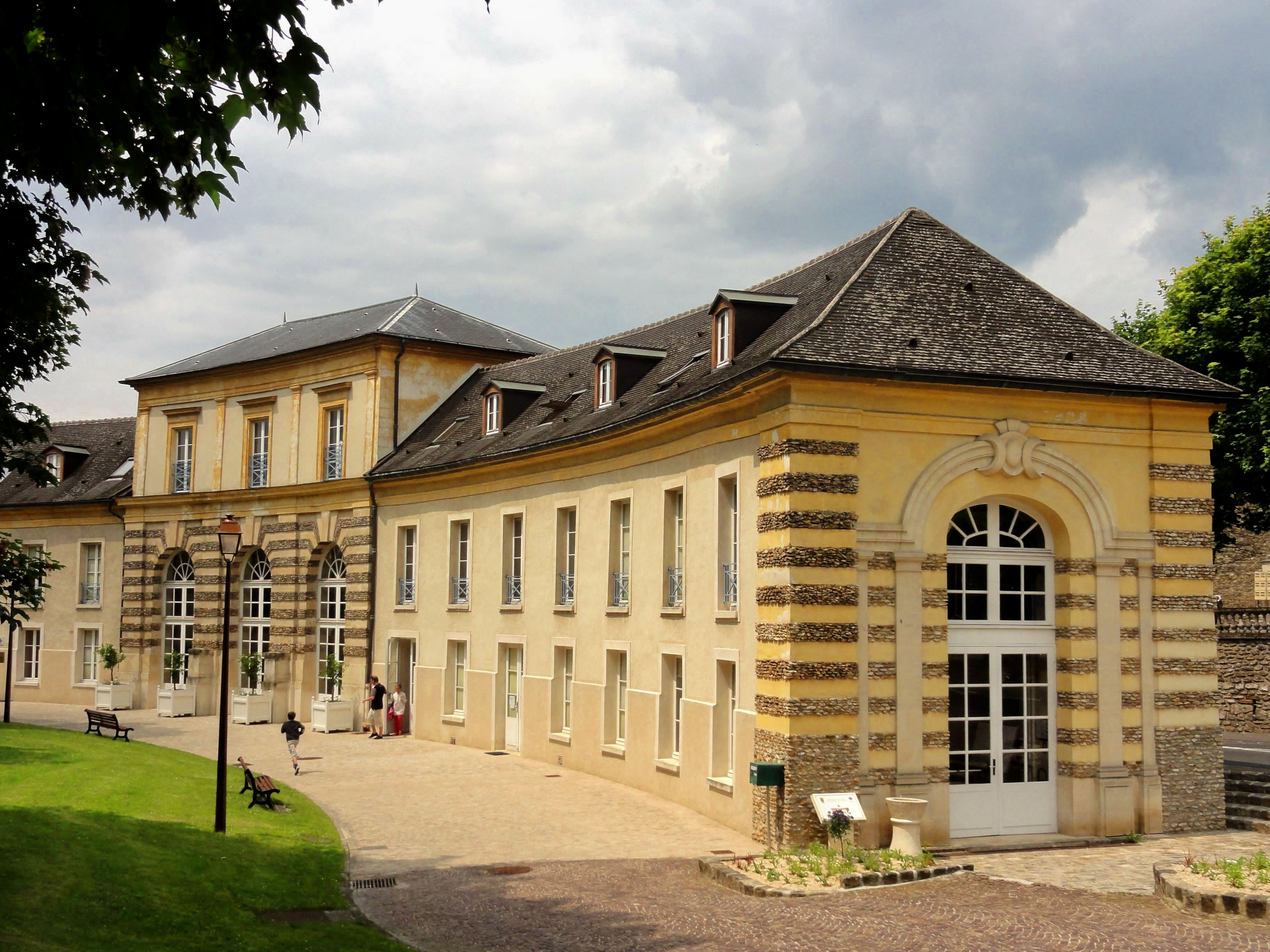 Orangerie du château, actuel conservatoire municipal de musique et de danse, 23-27 rue du Temple.